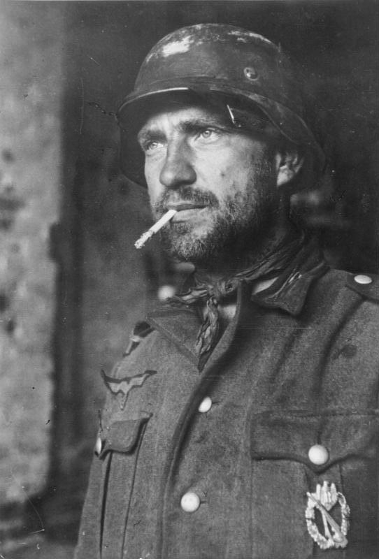 In Stalingrad. Köpfe unserer Grenadiere, die das Geschützwerk in Stalingrad stürmten. PK-Aufnahme: Kriegsberichter Gehrmann (PBZ) 27.11.42 [Herausgabedatum]